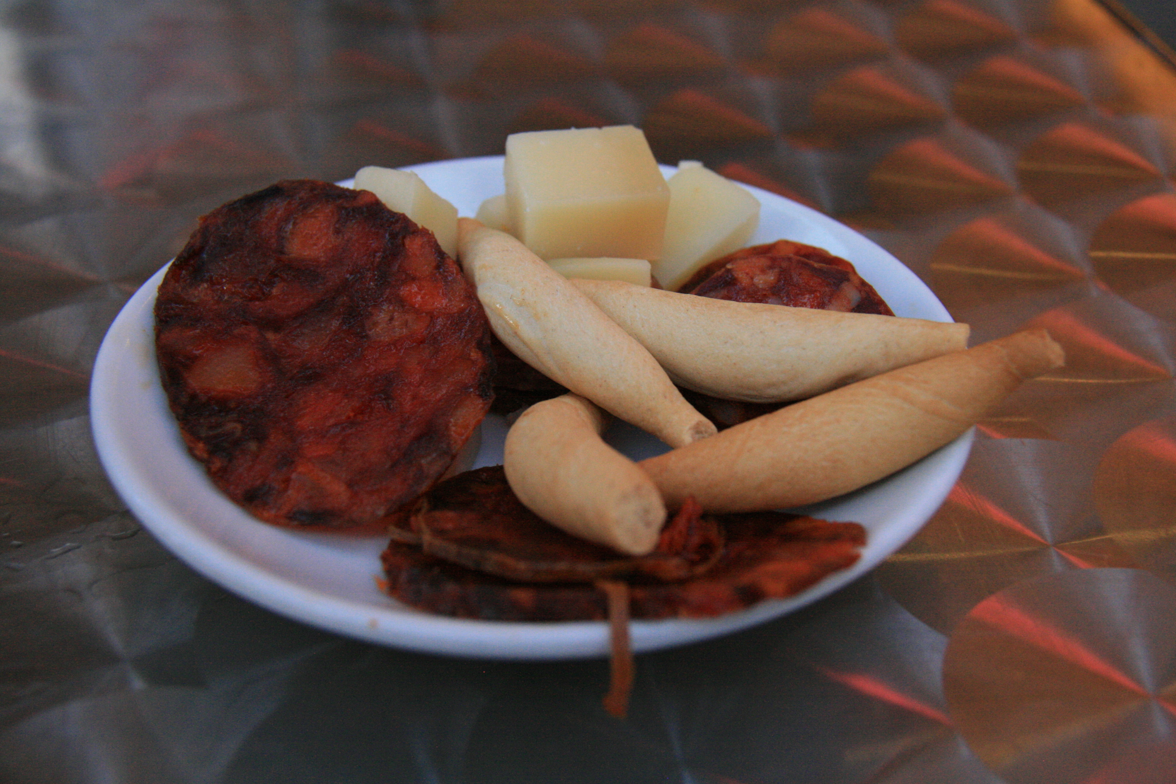 Chorizo - Picos y queso